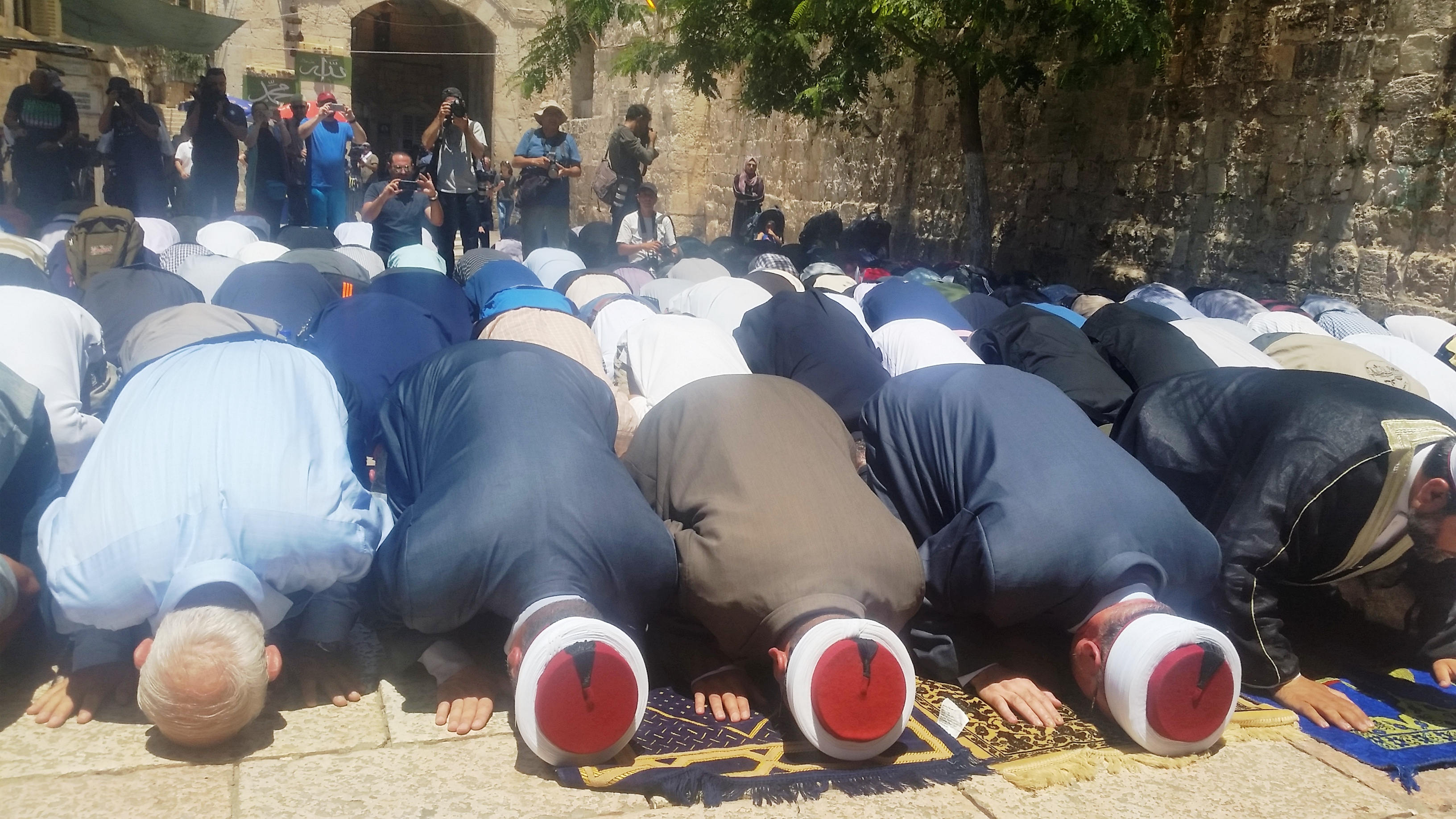 שער השבטים בכניסה להר הבית. בתמונה תפילת מחאה של מוסלמים שסירבו להיכנס למתחם הר הבית לאחר שהמשטרה הציבה מגנומטרים בכניסות, בעקבות הפיגוע הפיגוע בהר הבית שהתרחש ב- 14 ביולי 2017